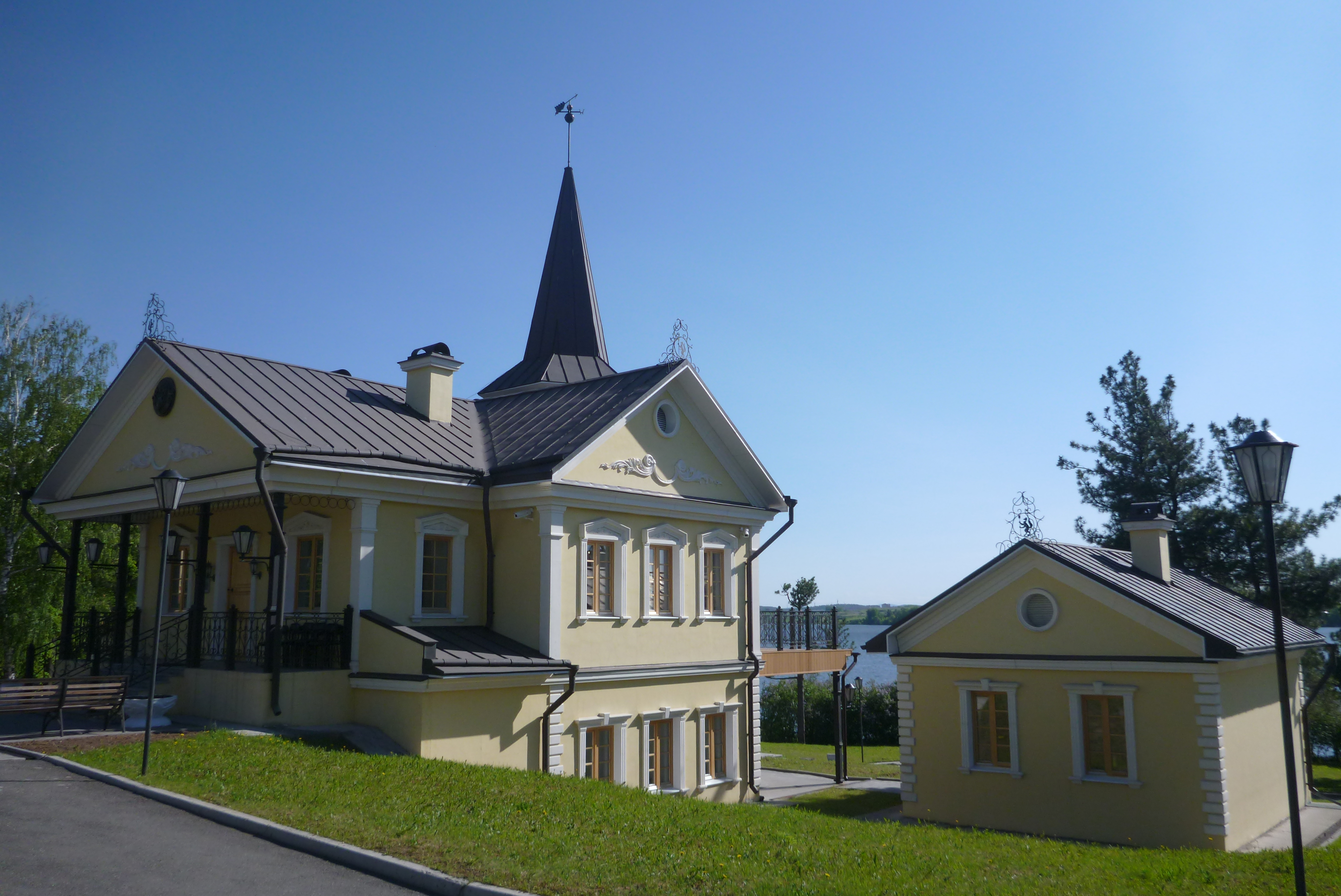 Демидовская дача с флигелем фото 2019 года